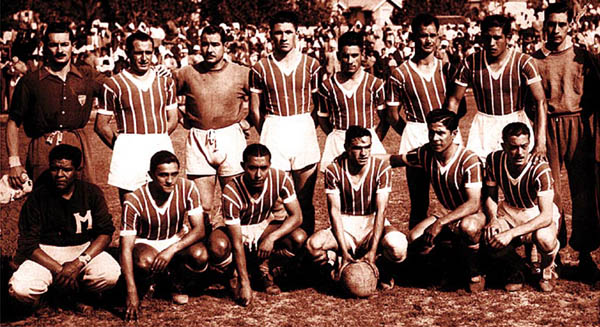 El plantel de Godoy Cruz Antonio Tomba, campeón de la Liga Mendocina 1954 .